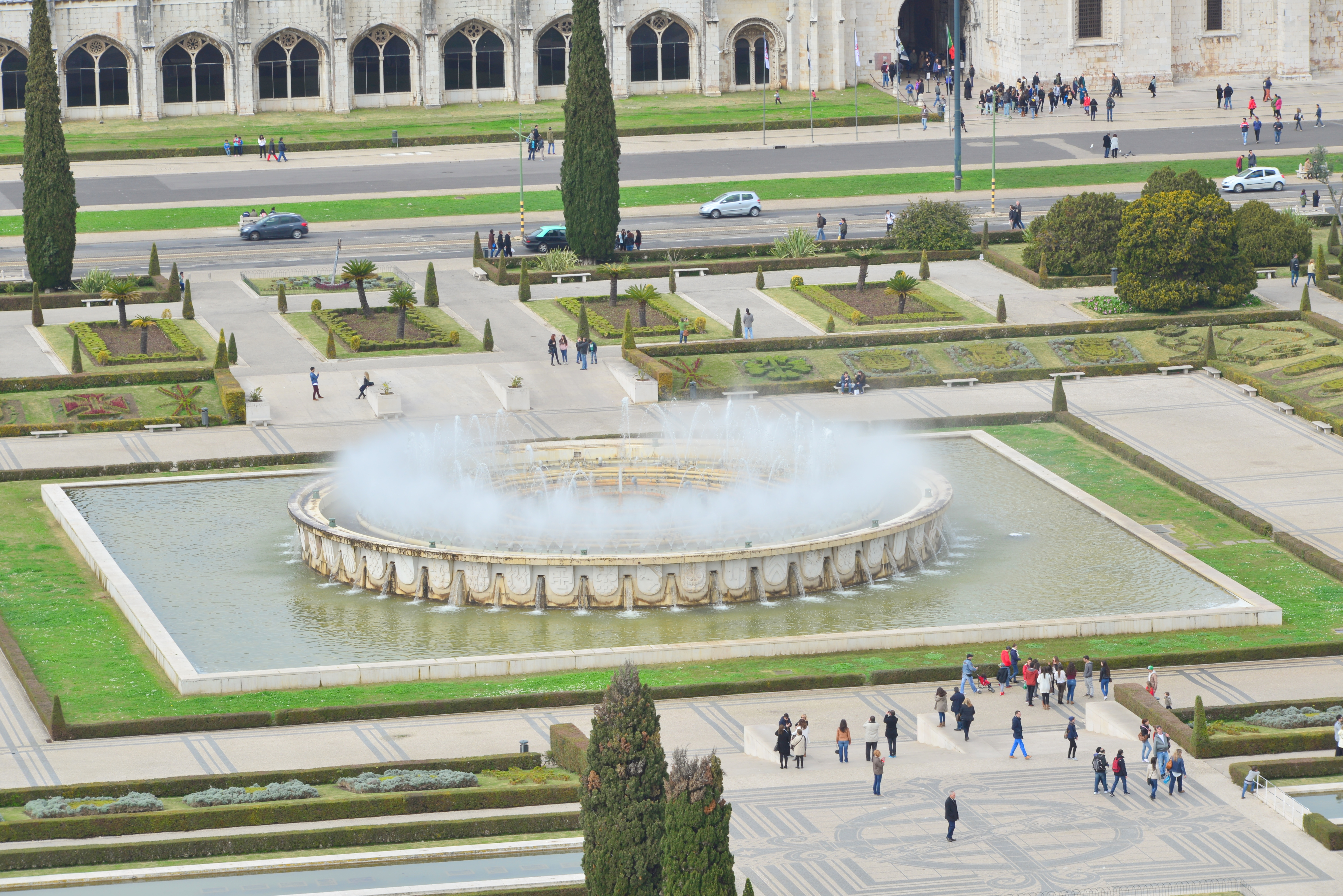 Portugal